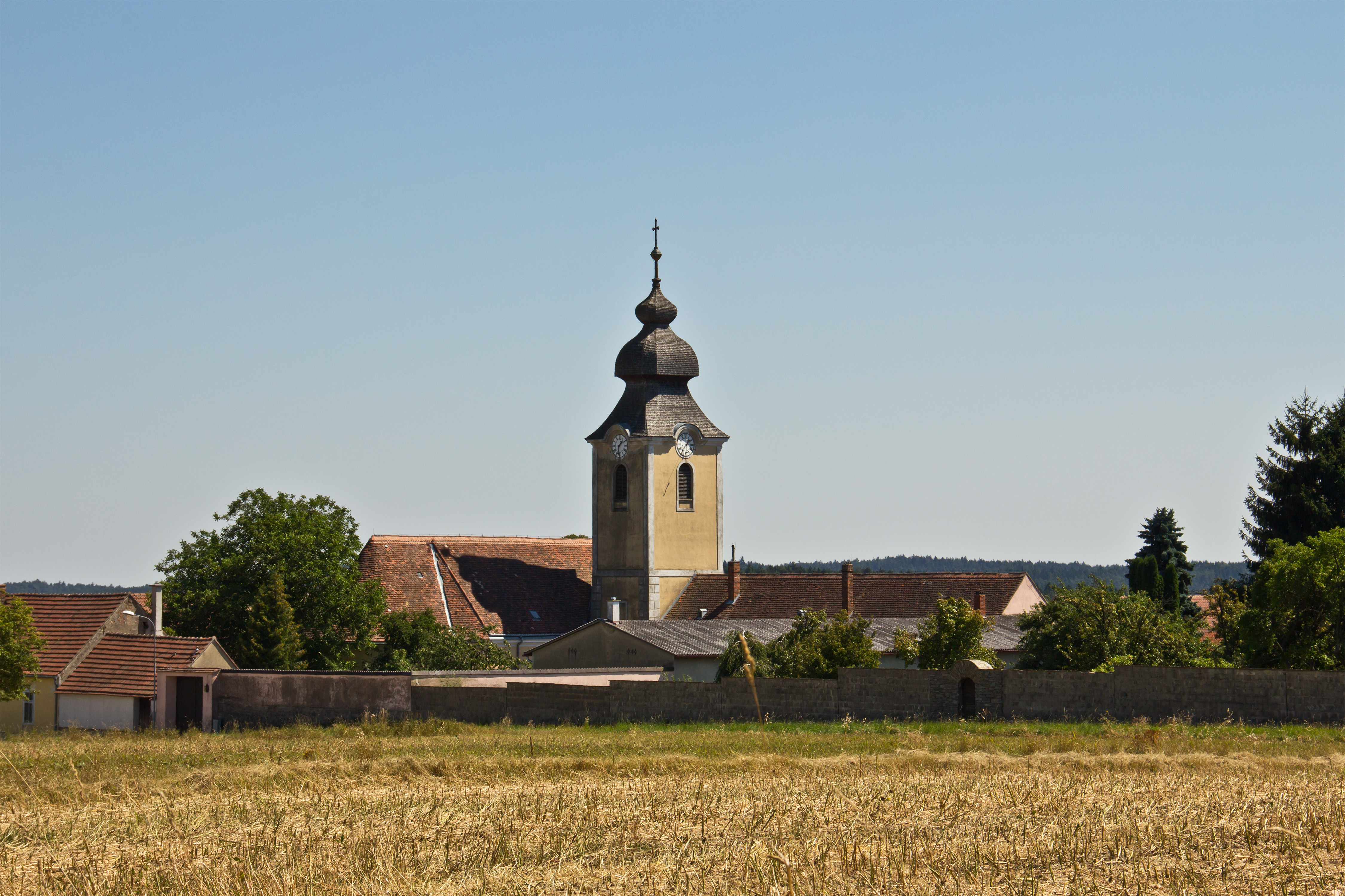 Kath. Pfarrkirche hl. Rochus in Harth